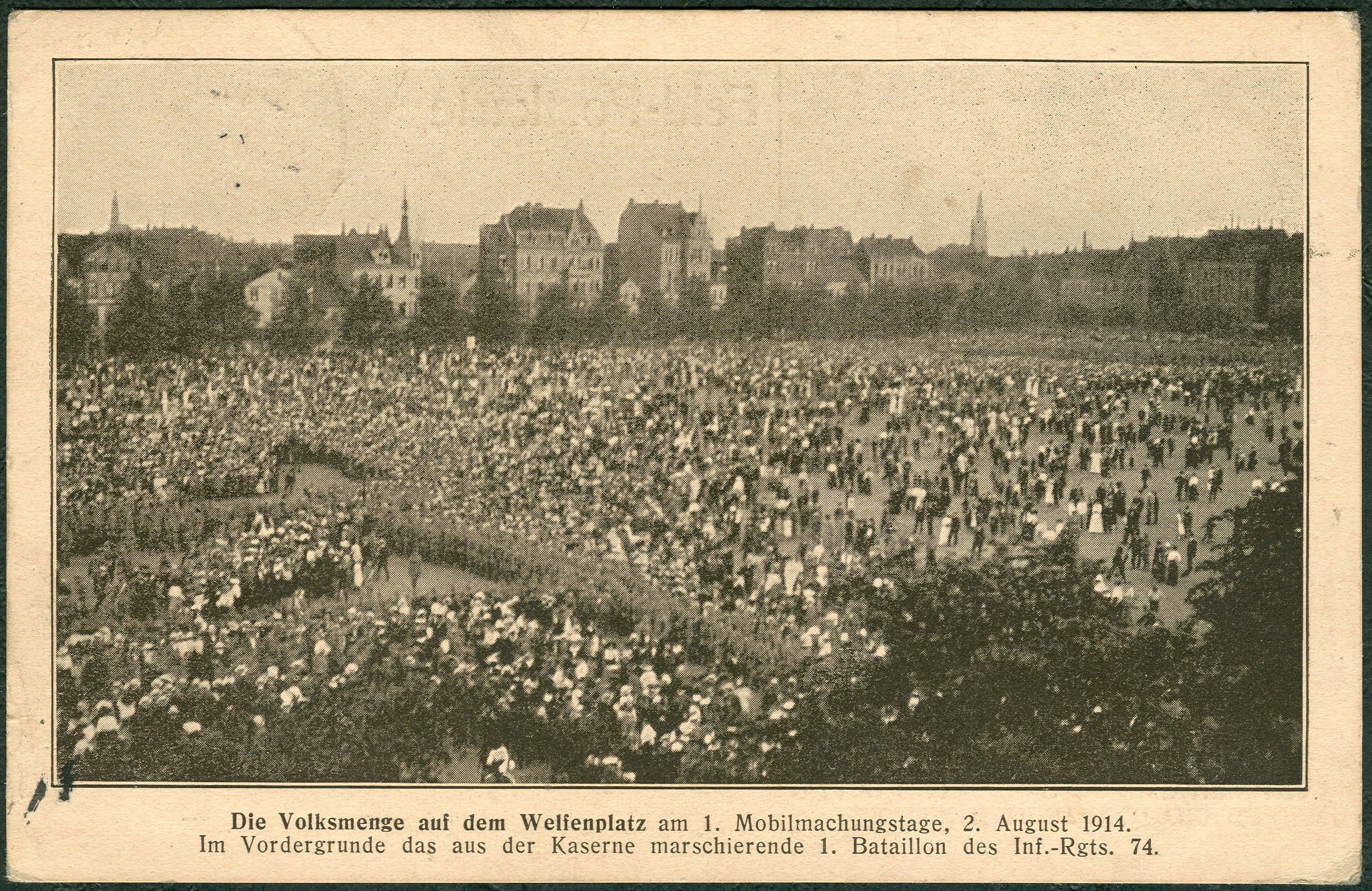 "Ansichtskarte" vom (sinngemäß) „1. Mobilmachungstage für den Ersten Weltkrieg am 2. August 1914“ beginnend mit dem „Antreten der 3. Kompanie 1. Hannoverschen Infanterie-Regiments Nr. 74 auf dem Kasernenhof am Welfenplatz.“ Nachdem "Oberleutnant Oesterreich" die Aufstellung überwacht hatte, konnte zunächst offenbar das "1. Bataillon" durch die auf dem Welfenplatz versammelte Volksmenge hindurch "ins Feld" ausrücken. Gegen Ende 1916 nahm der Unteroffiziert Henry Harland die als Postkarten reproduzierten Fotos, „Gewidmet von der Continental-Caoutchouc- und Gutta-Percha-Compagnie Hannover“ , um sowohl seiner lieben Schwester Fridel' und seinem Vater Wilhelm in der Angerstraße 8 in Hannover (Überlebens-)Nachrichten von der Westfront zukommen zu lassen. Inzwischen war der Unteroffizier offensichtlich der 11. Kompanie zugeteilt worden, die Feldpost-Stempel von der "19. Infanterie-Division".wurden teilweise jedoch „Aus militärischen Gründen verzögert.“ ...